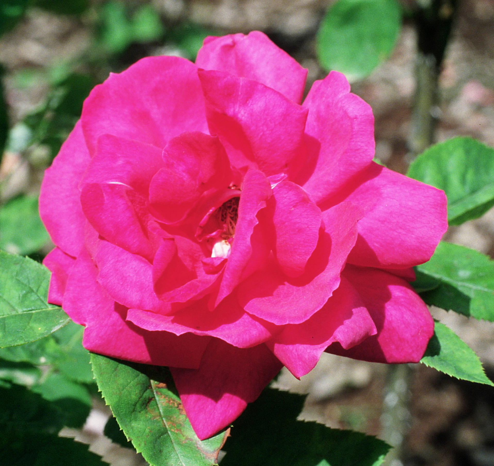 Rosa 'Captain Hayward', Híbridos reflorecientes, sect. Rosa. Real Jardín Botánico, Madrid